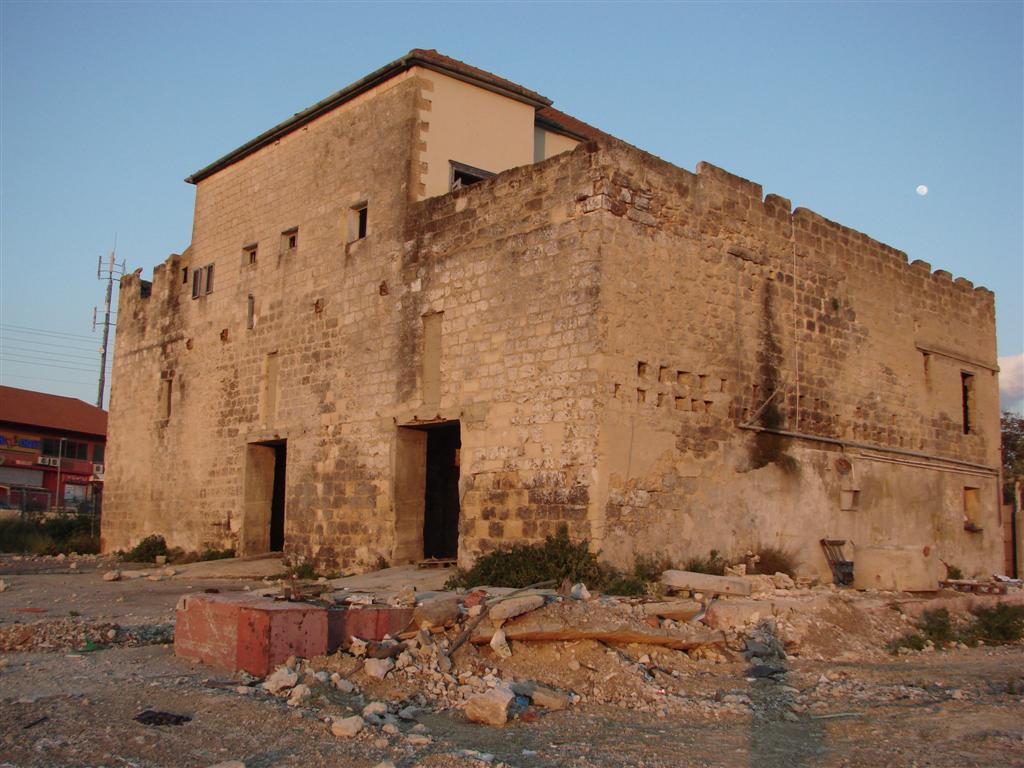 חאן רמת ישי - הפינה הדרום מערבית 1